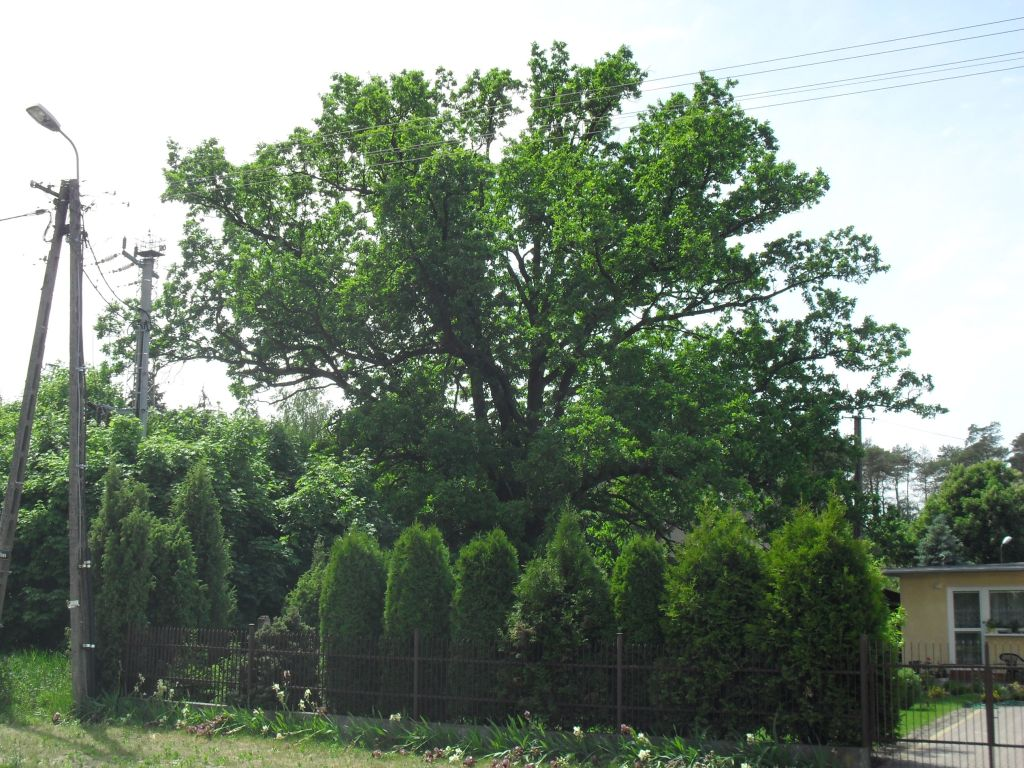 Dąb szypułkowy - pomnik przyrody - rosnący przy ul. Sarniej w Trzcińcu.